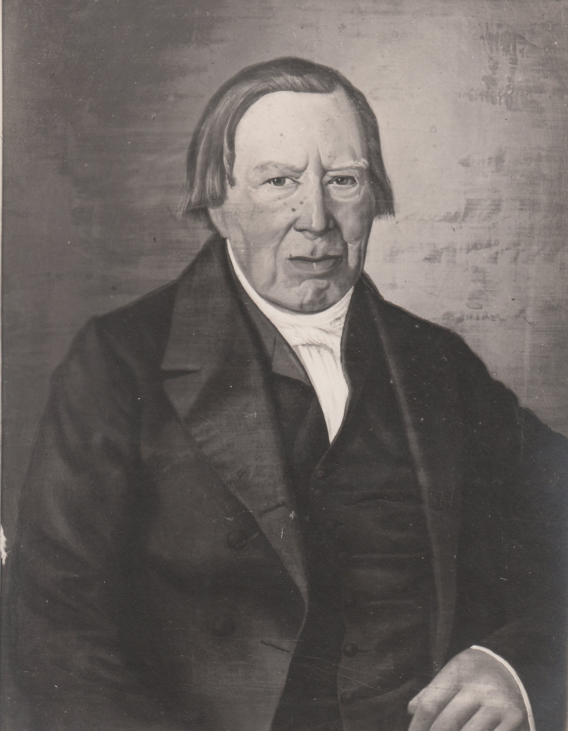 Format: Fotopositiv Dato / Date: 1897 Fotograf / Photographer: Erik Olsen (1835 - 1920). Sted / Place: Fra utstillingen i anledning Trondhjems 900-årsjubileum i 1897 Eier / Owner Institution: Trondheim byarkiv, The Municipal Archives of Trondheim Lenke / Link: Ole Andreas Lindeman (Wikipedia) // - Se også Lindemans Legat Arkivreferanse / Archive reference: Tor.H41.B40.F2991 Merknad: Utstillingstekst i Trondhjems 900 Aars Jubilæum: Katalog for Den Historiske Udstilling i Trondhjem 1897: 1004. Lindeman, Ole Andreas, f. 1769 paa Øie i Surendalen, d. 1857, Søn af Sorenskriver i Nordmør Jacob Madsen L. (f. 1735, d. 1822); Organist ved Frue Kirke fra 1802. OM., Brystbill. i 1/2 Størr., sign.: Balle Lund px. 12 - 1860. Organist Chr. Lindeman.